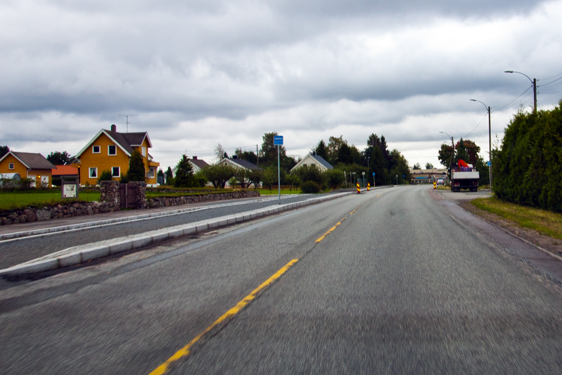 Fylkesvei 256 Raveien ved Elgesem i Sandefjord. Tidligere E18.